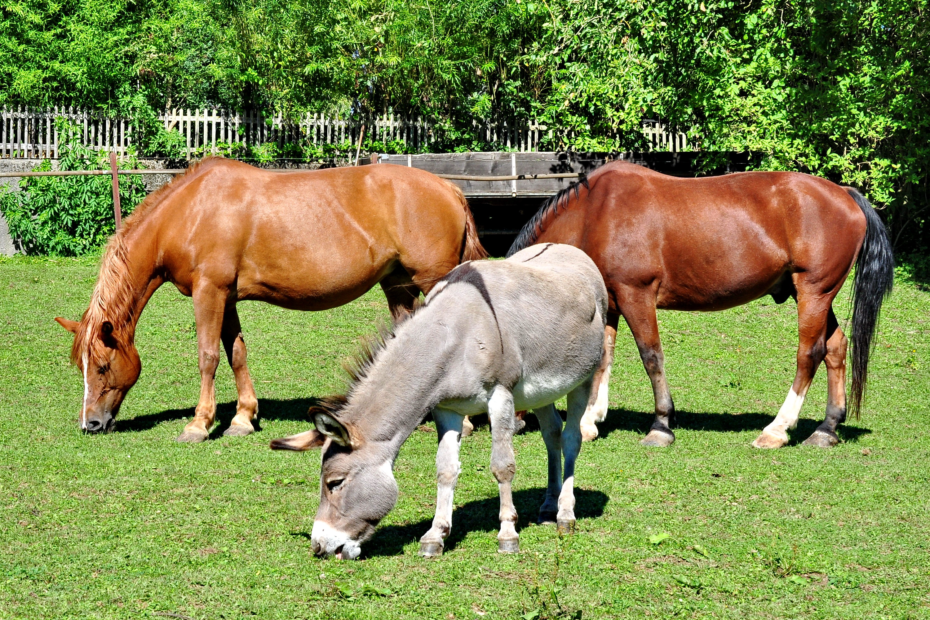 Gut Katzensee in Regensdorf (Switzerland)